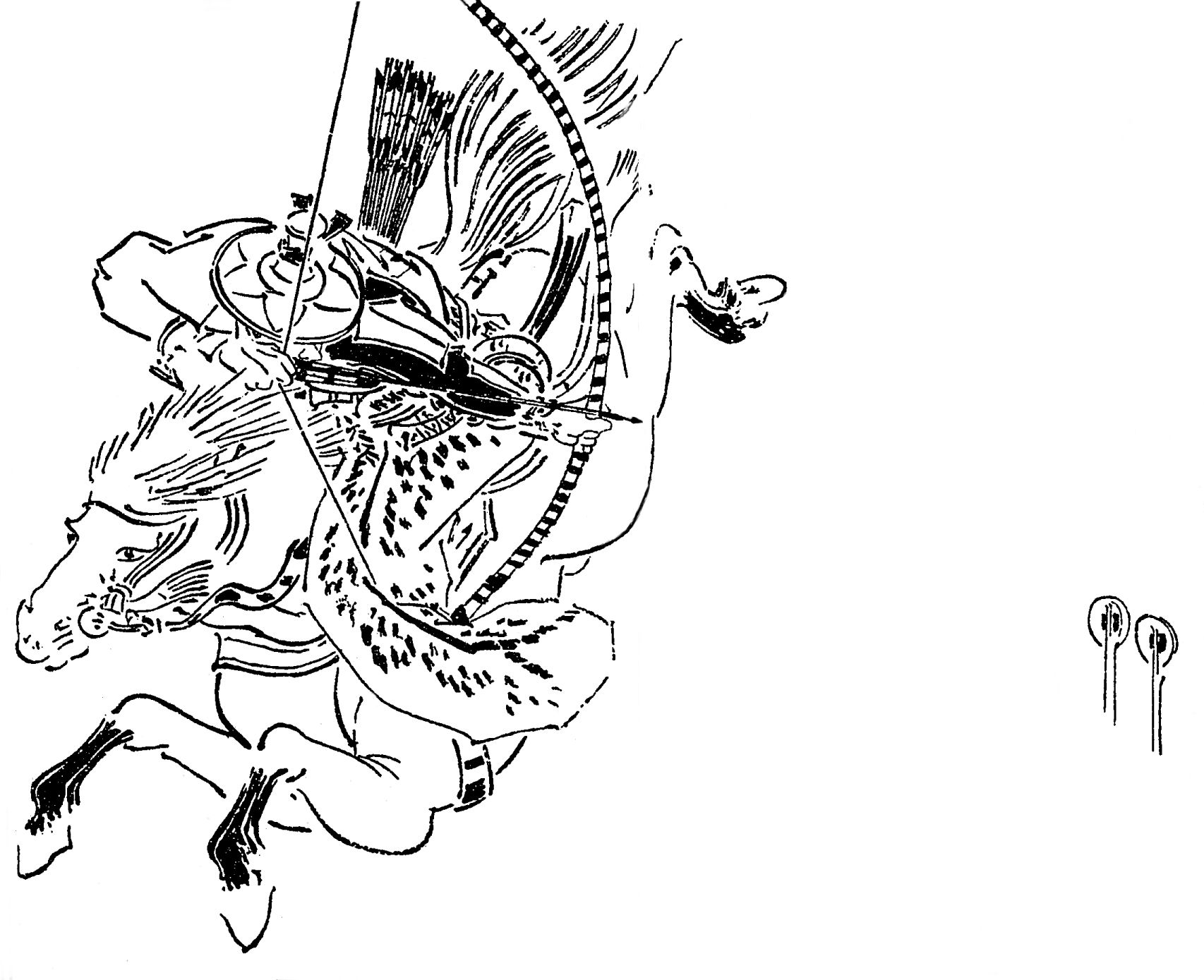 諏訪盛澄（金刺盛澄）。平安時代末期 - 鎌倉時最初期の武将。／江戸時代『前賢故実』より。画：菊池容斎